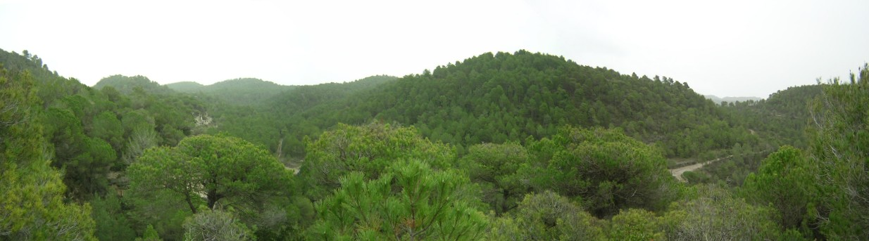 El Bosc Mitger (Castellcir i Monistrol de Calders, Moianès)